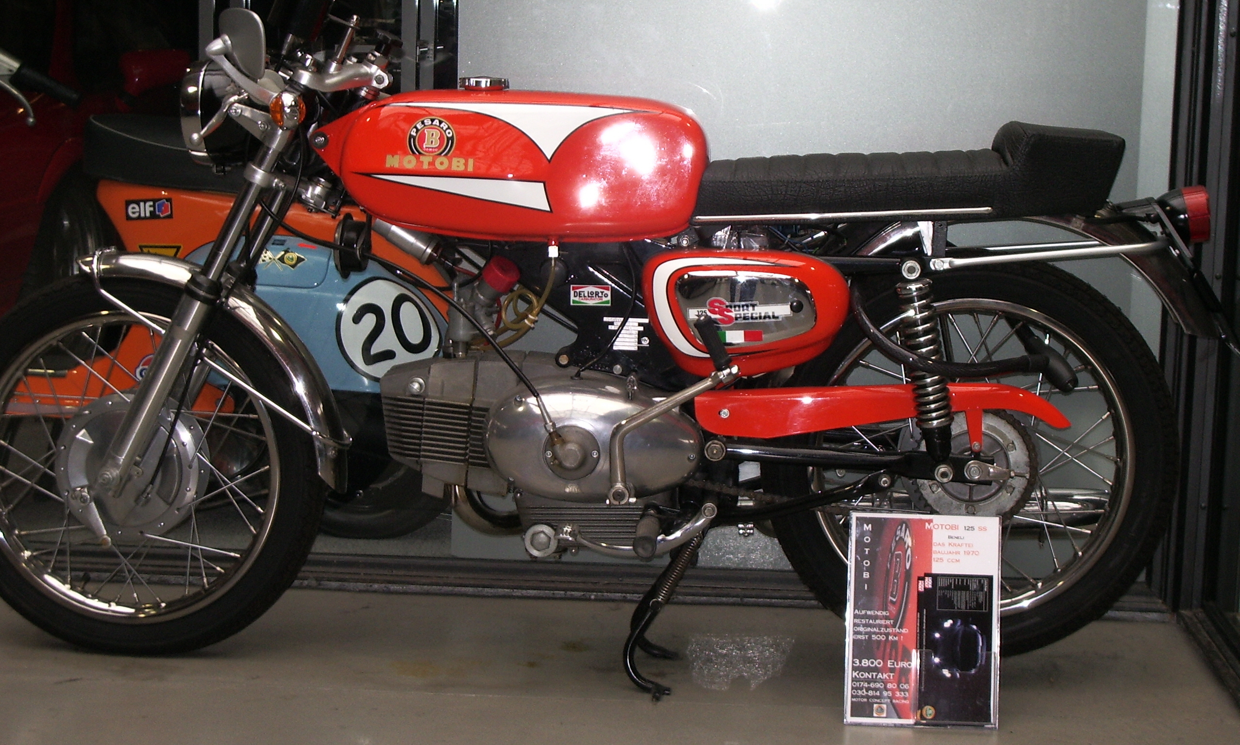 Motobi Kraftei 125ccm, selbst fotografiert im Museum.